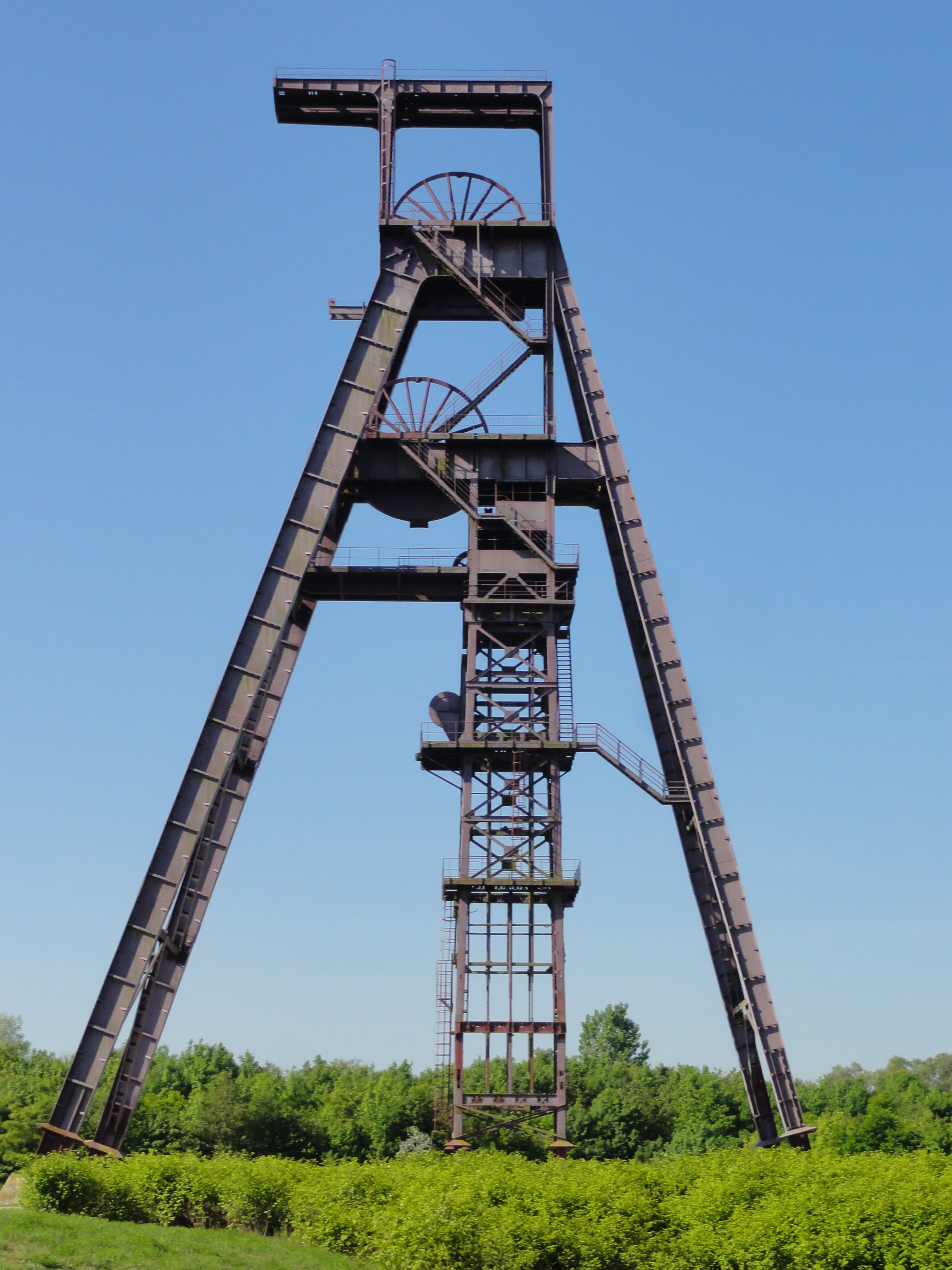 La fosse Ledoux de la Compagnie des mines d'Anzin était un charbonnage du bassin minier du Nord-Pas-de-Calais constitué de deux puits situé à Condé-sur-l'Escaut, Nord, Nord-Pas-de-Calais, France. .